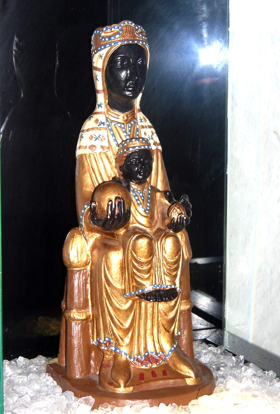 Kapelle Maria im Schnee (Ennepetal-Schemm)